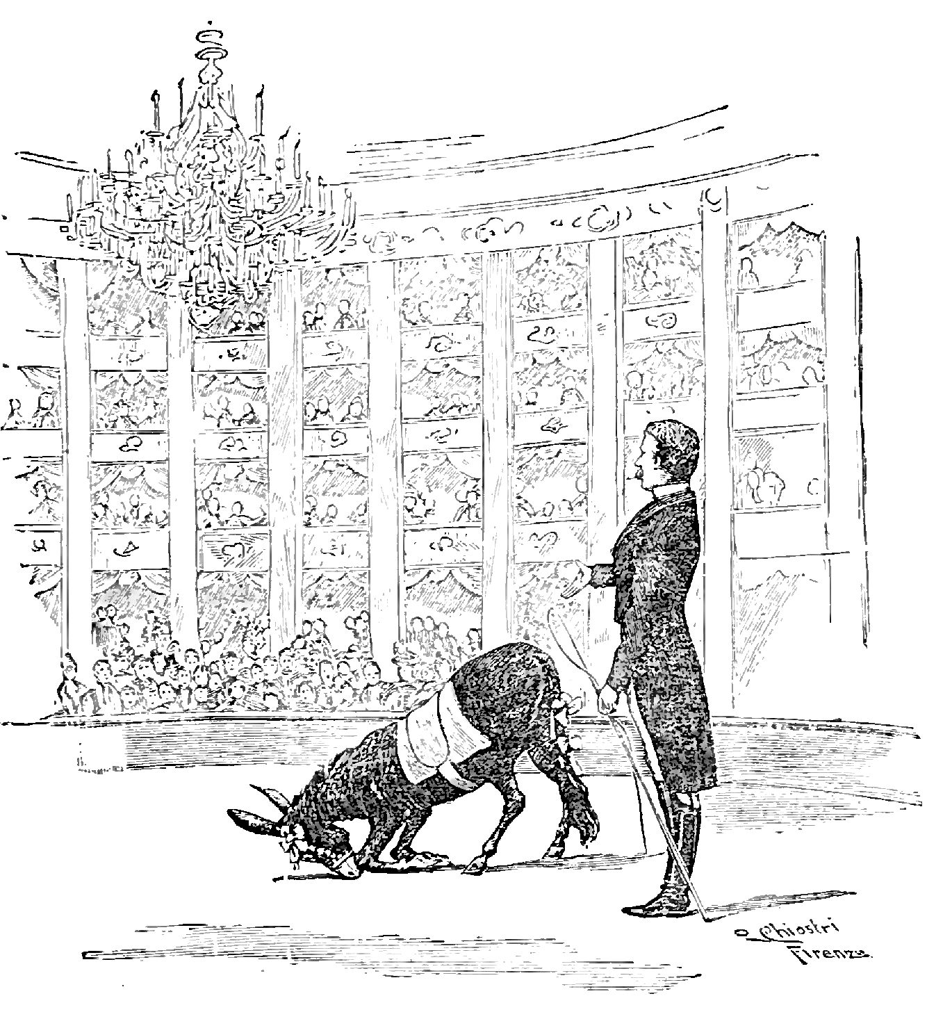 Illustrations from "Le avventure di Pinocchio, storia di un burattino", Carlo Collodi, Bemporad & figlio, Firenze 1902 (Drawings and engravings by Carlo Chiostri, and A. Bongini)